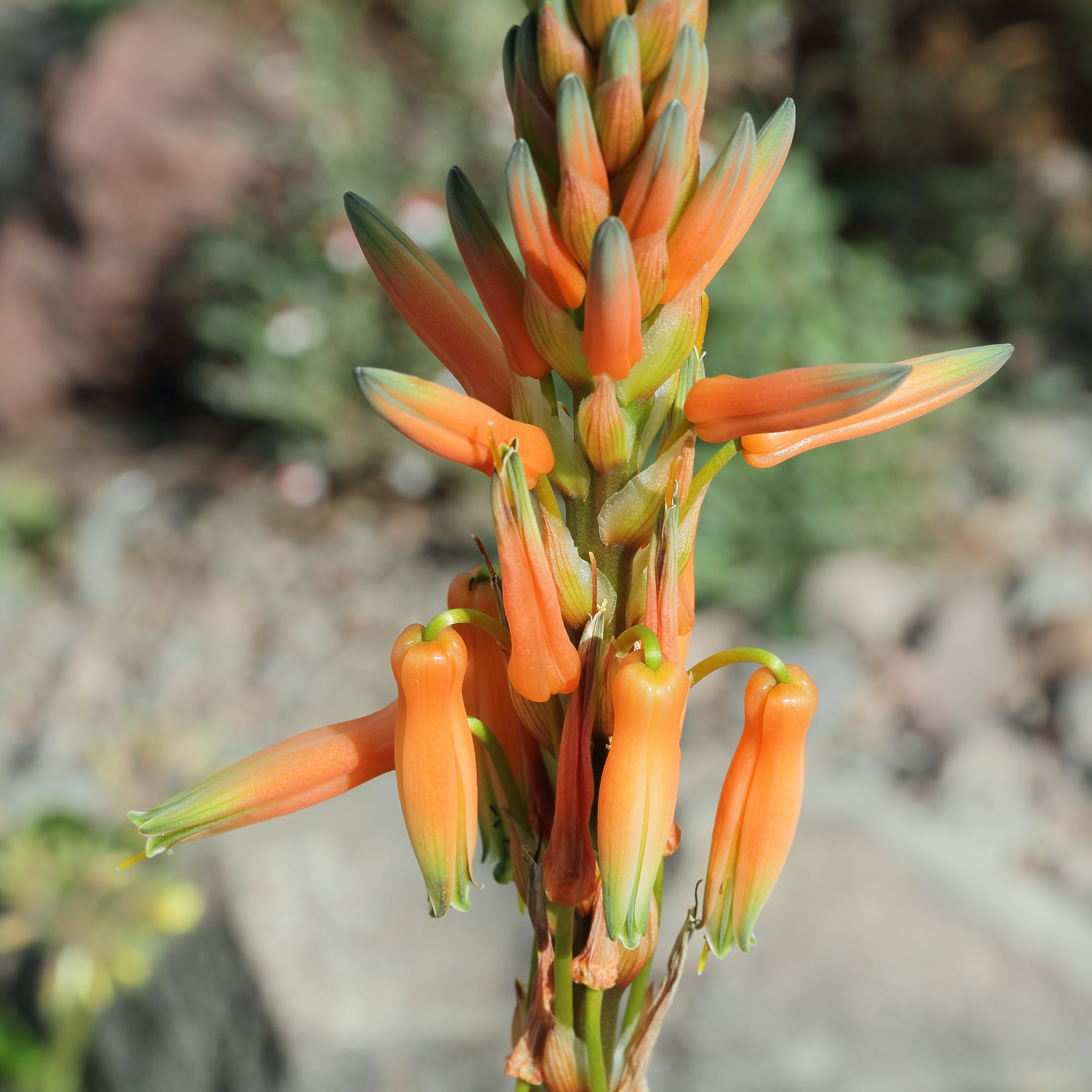 Aloe glauca i Bergianska trädgården.